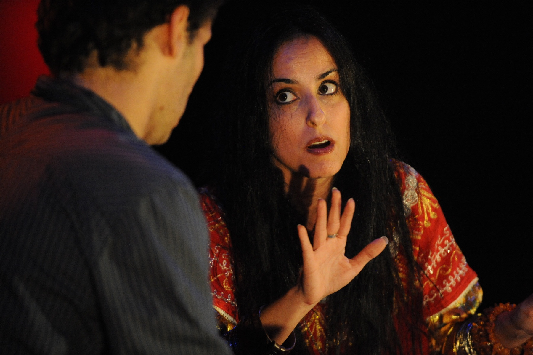 רונית בקרמן - 5 קילו סוכר עם גור קורן 2010